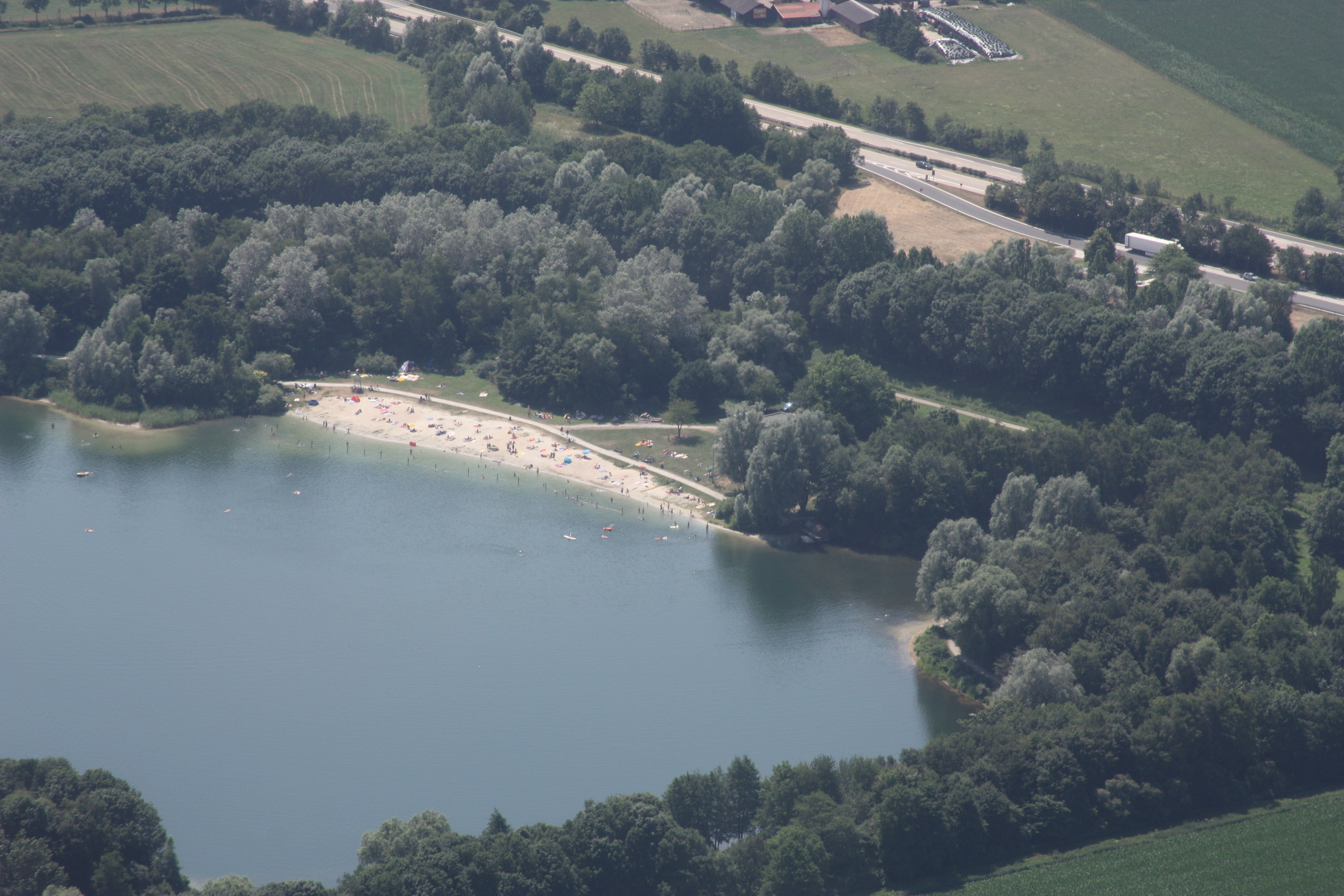 Flug über Oldenburg; von Wilhelmshaven kommend nach Hatten; Flughöhe 500 m = 1500 ft; Juli 2010